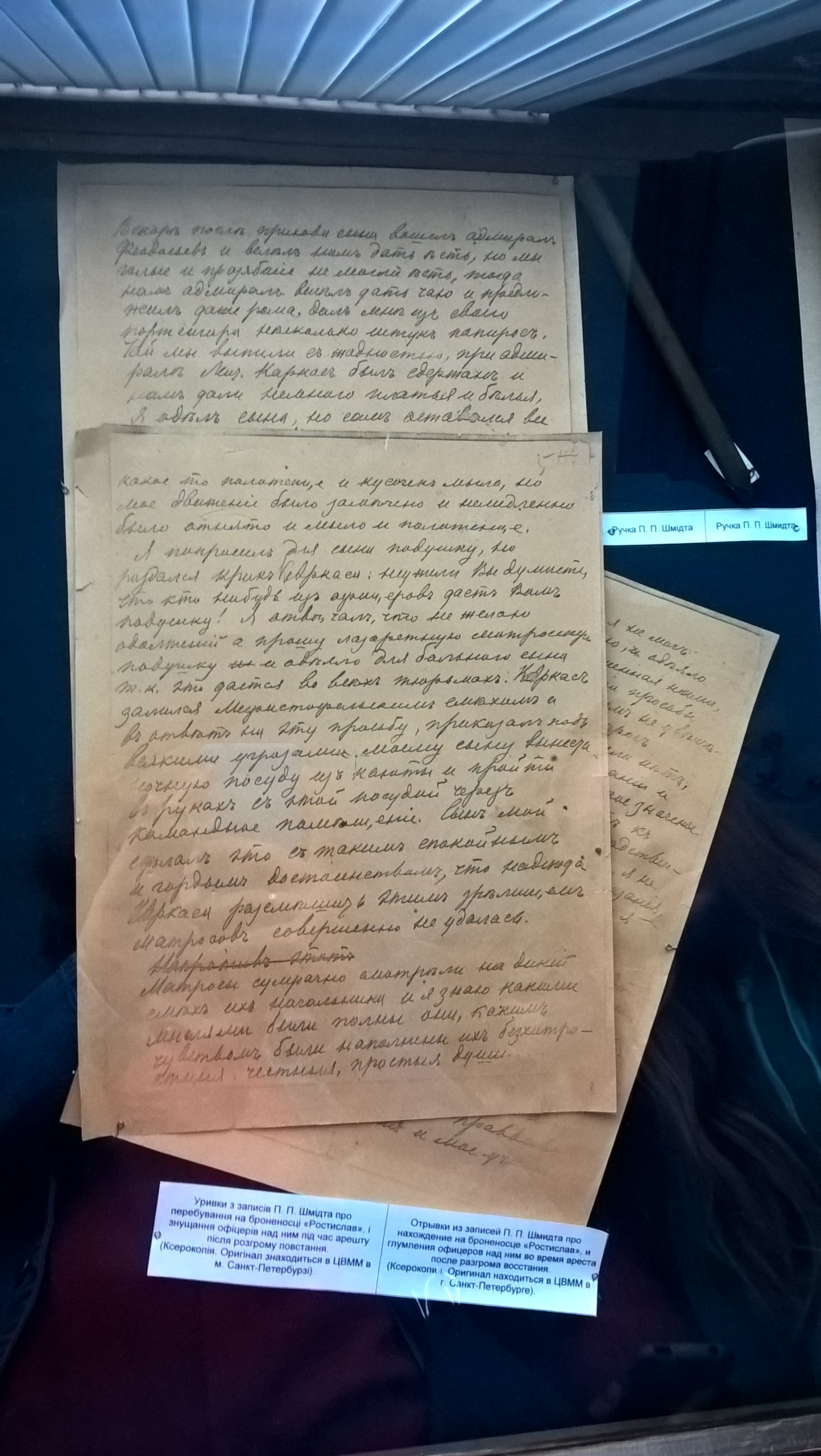 Listy pisane przez Piotra Szmidta